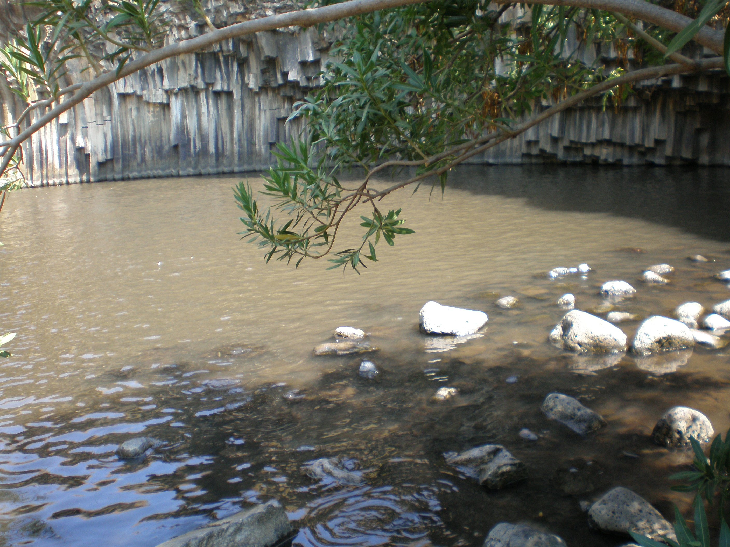 Taken in Brekhat Ha'Meshushim (בריכת המשושים), Golan Heights, Israel.